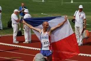 Christophe se classe 2ème et devient vice Champion d'Europe vétérans sur 800m